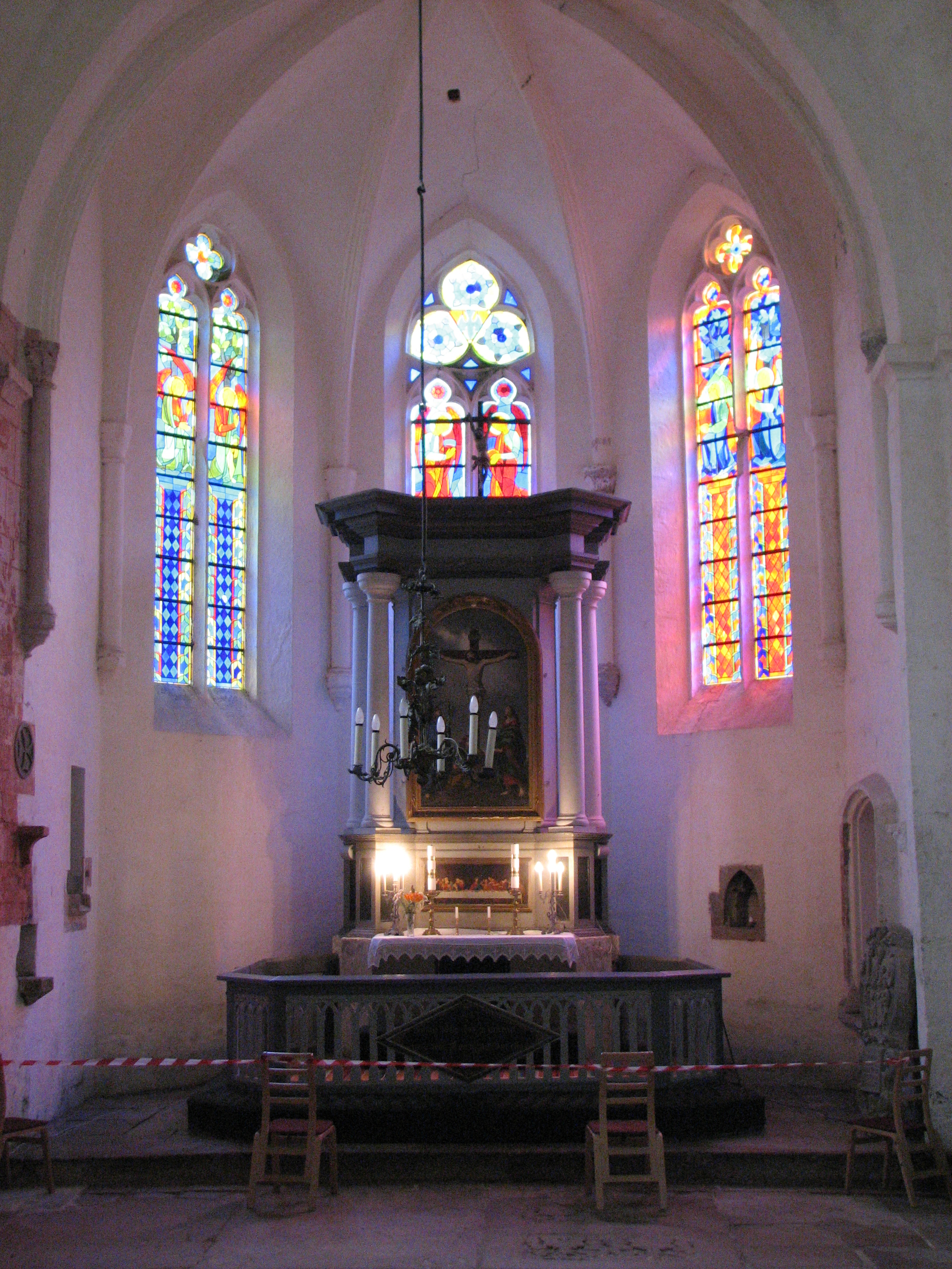 Valjala kiriku altar